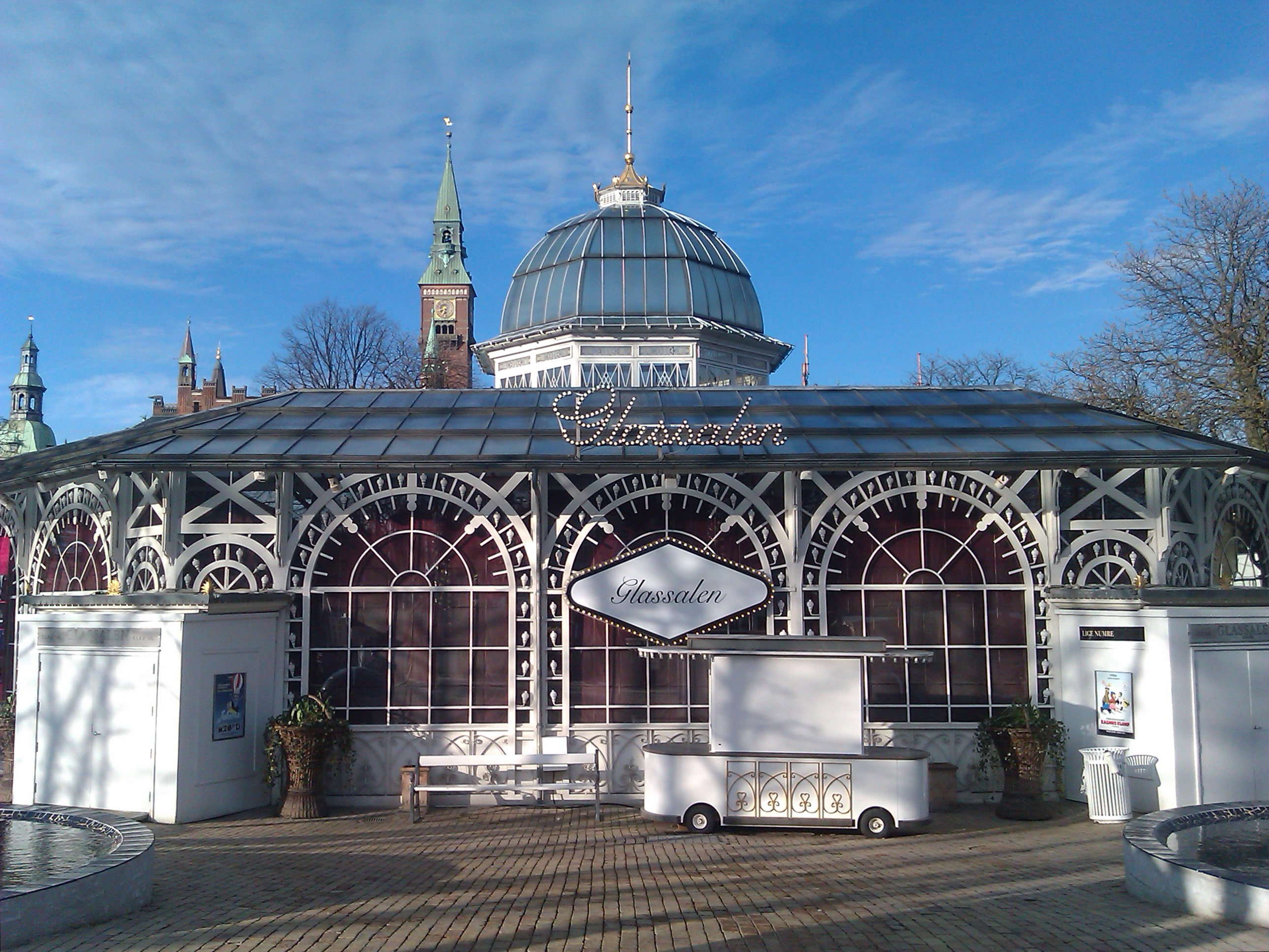 Glassalen i Tivoli, København